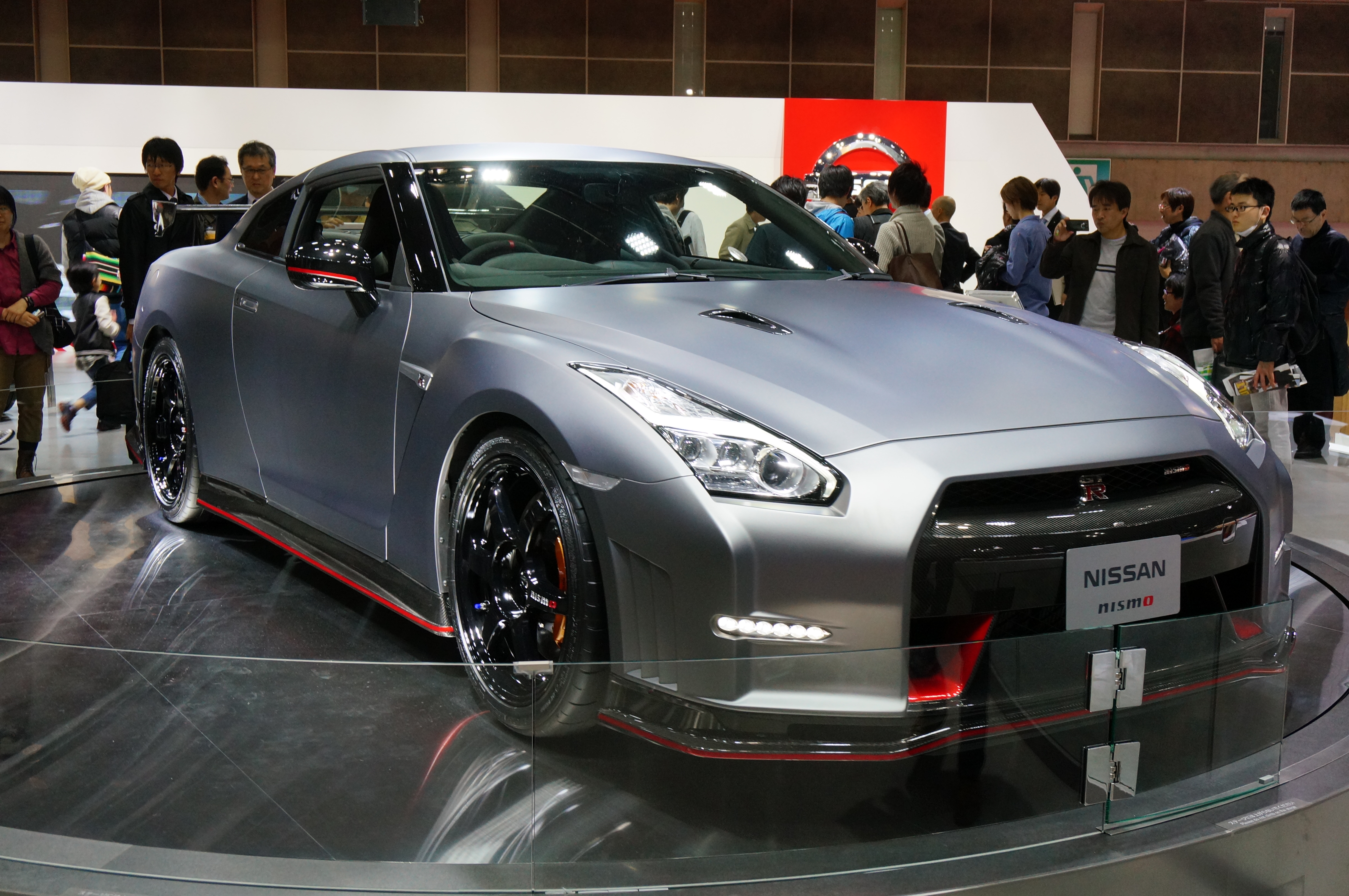 東京モーターショー2013にて作者自身が撮影。